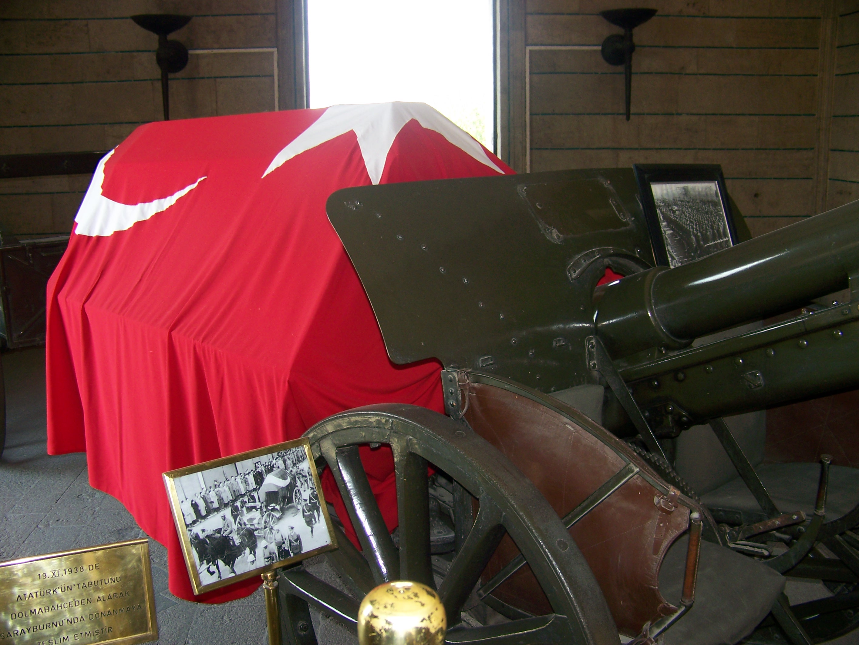 Le chariot qui a transporté la tombe d'Atatürk